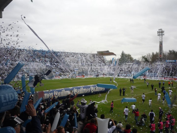 Salida a la cancha del Quilmes Atletico Club.